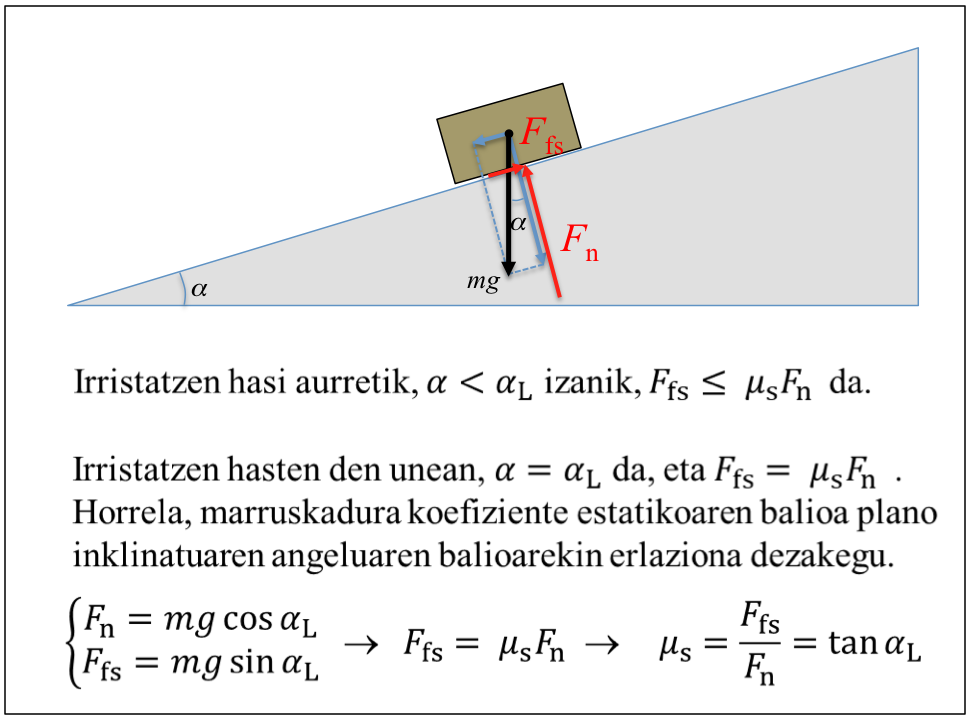 Marruskadura-koefiziente estatikoaren eta plano inklinatuaren angeluaren arteko erlazioaren azalpena.